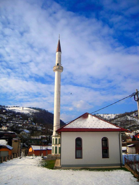 Јама џамија